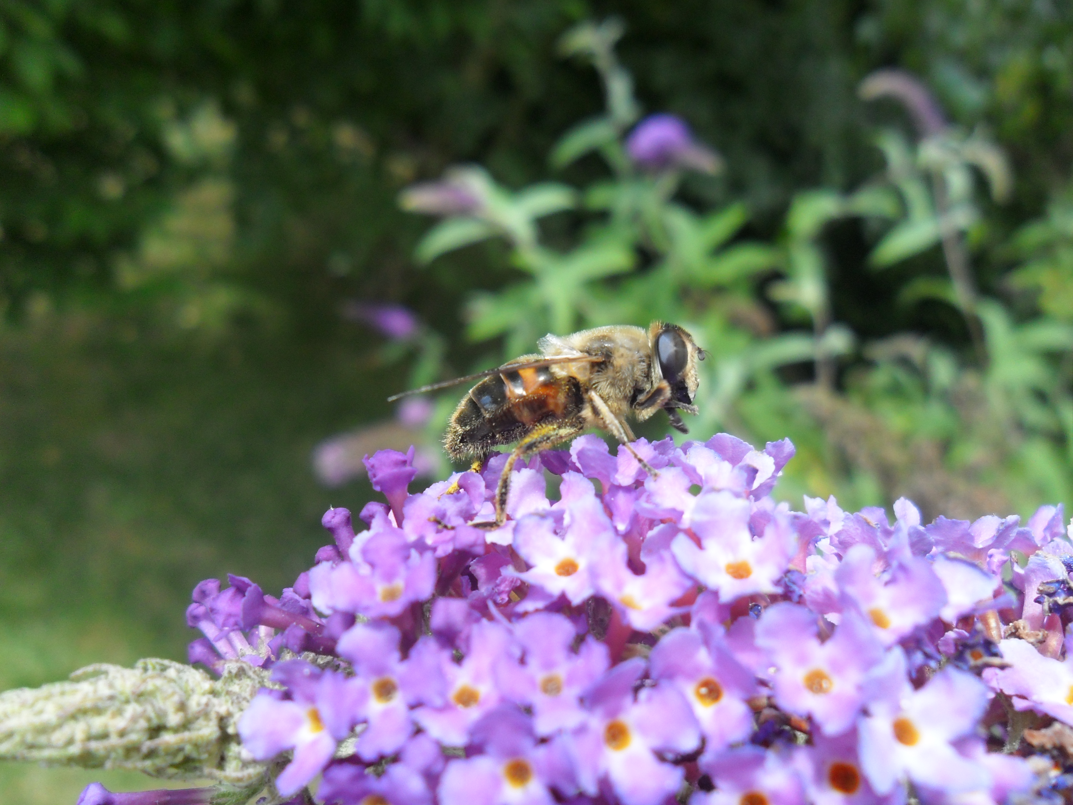 Trouvé le 30/07/12 à 13h18 sur arbre à papillon